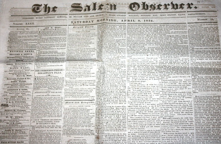 Newspaper, Salem, Massachusetts, USA